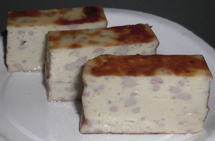 Tofu-castella (豆腐カステラ)